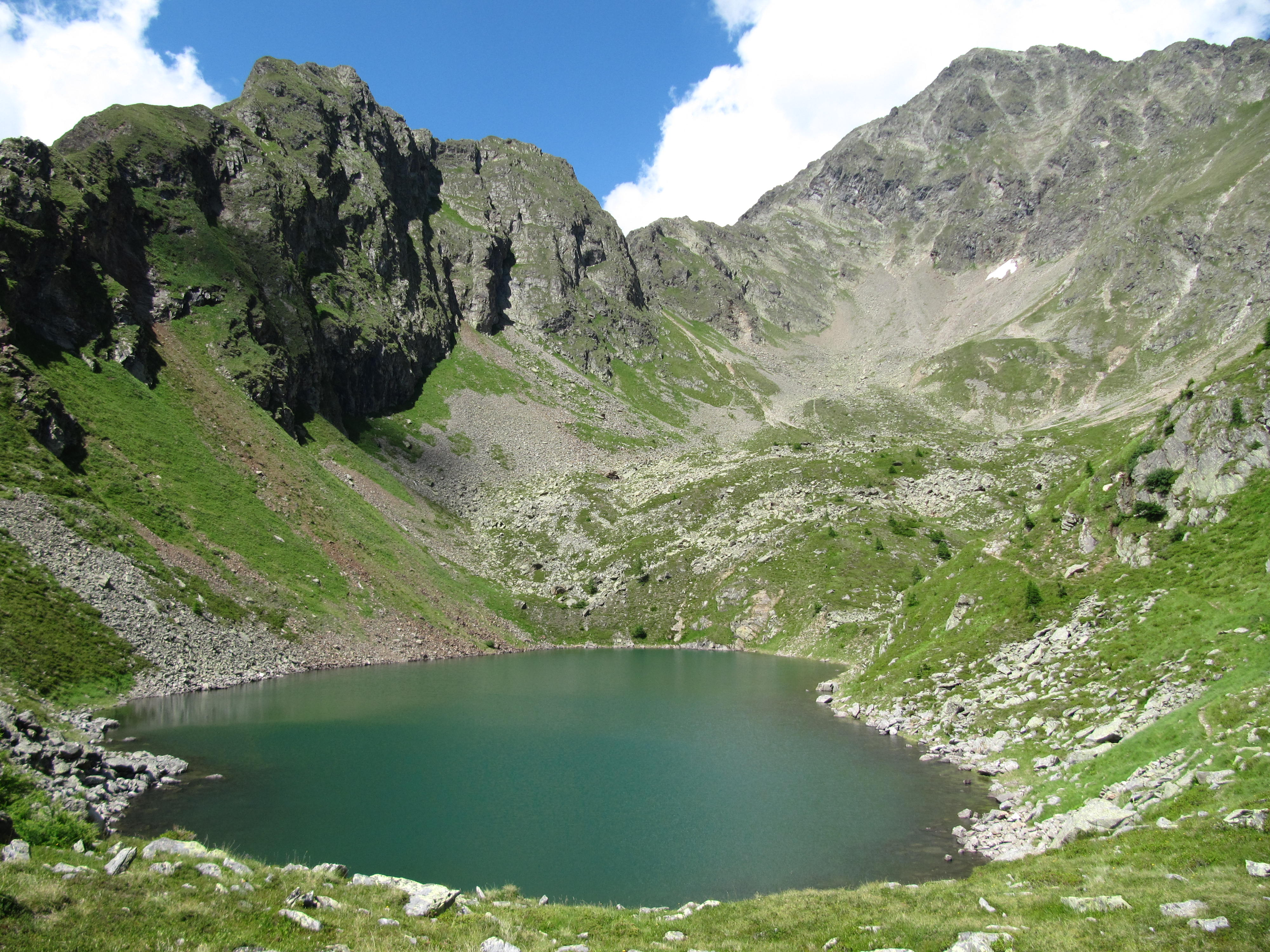 Piendlsee mit Furtriegel (2367m) und Kasereck (2740m)